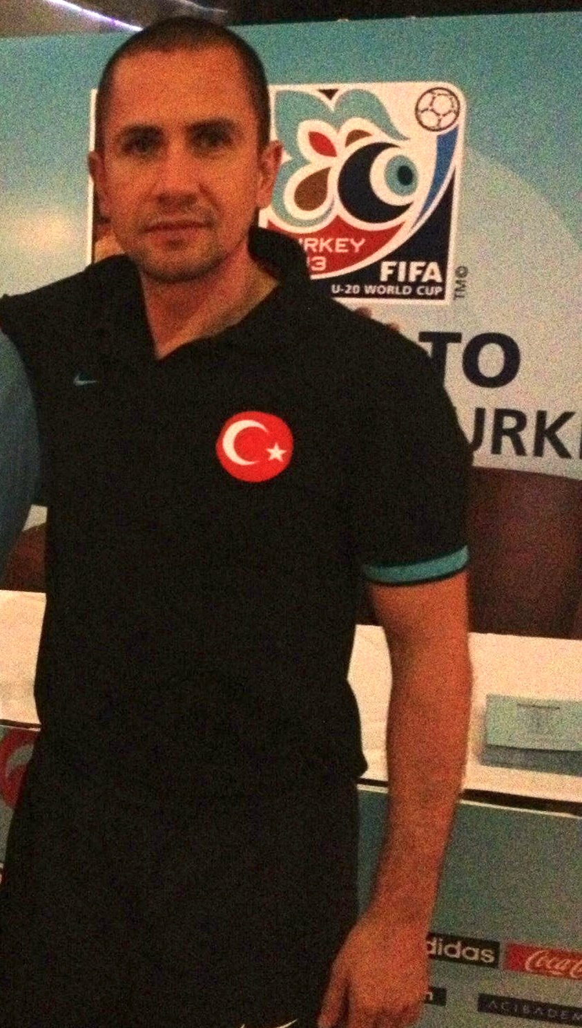 Emre Aşık Turnuvada çektirdiğim bir foto